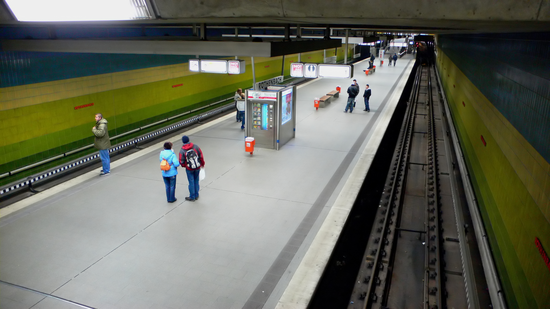 U-Bahnhof Röthenbach der U-Bahn Nürnberg, Bahnsteigebene, Blick von Osten.